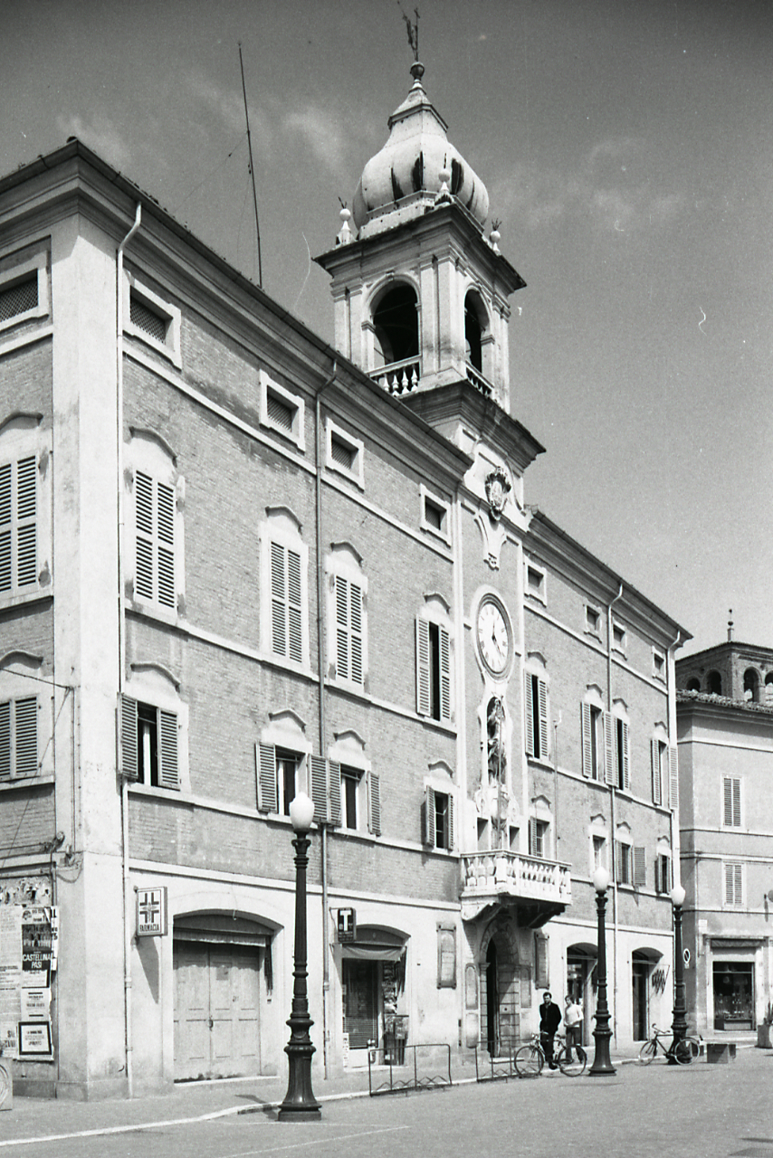 Palazzo municipale di Finale Emilia. Servizio fotografico : Mirandola, 1976 / Paolo Monti. - Strisce: 1, Fotogrammi complessivi: 2 : Negativo b/n, gelatina bromuro d'argento/ pellicola ; 35 mm. - ((Sul portanegativi: N[I]K[MA]T FP4 e iscrizione didascalica e documentaria manoscritta a penna nera "[...] Mirandola 36/37". - Occasione: Documentazione monumenti artistici Emilia-Romagna. - , presso Archivio Paolo Monti. - Fonte: Fattura di Paolo Monti: IV. Commesse/ Fattura n. 09/ Fotografie monumenti artistici Emilia-Romagna (1976/07/05), presso Archivio Paolo Monti. - Fonte: Agenda di Paolo Monti: Leica 1501-3000 Controllo numerazione (1950-1978)